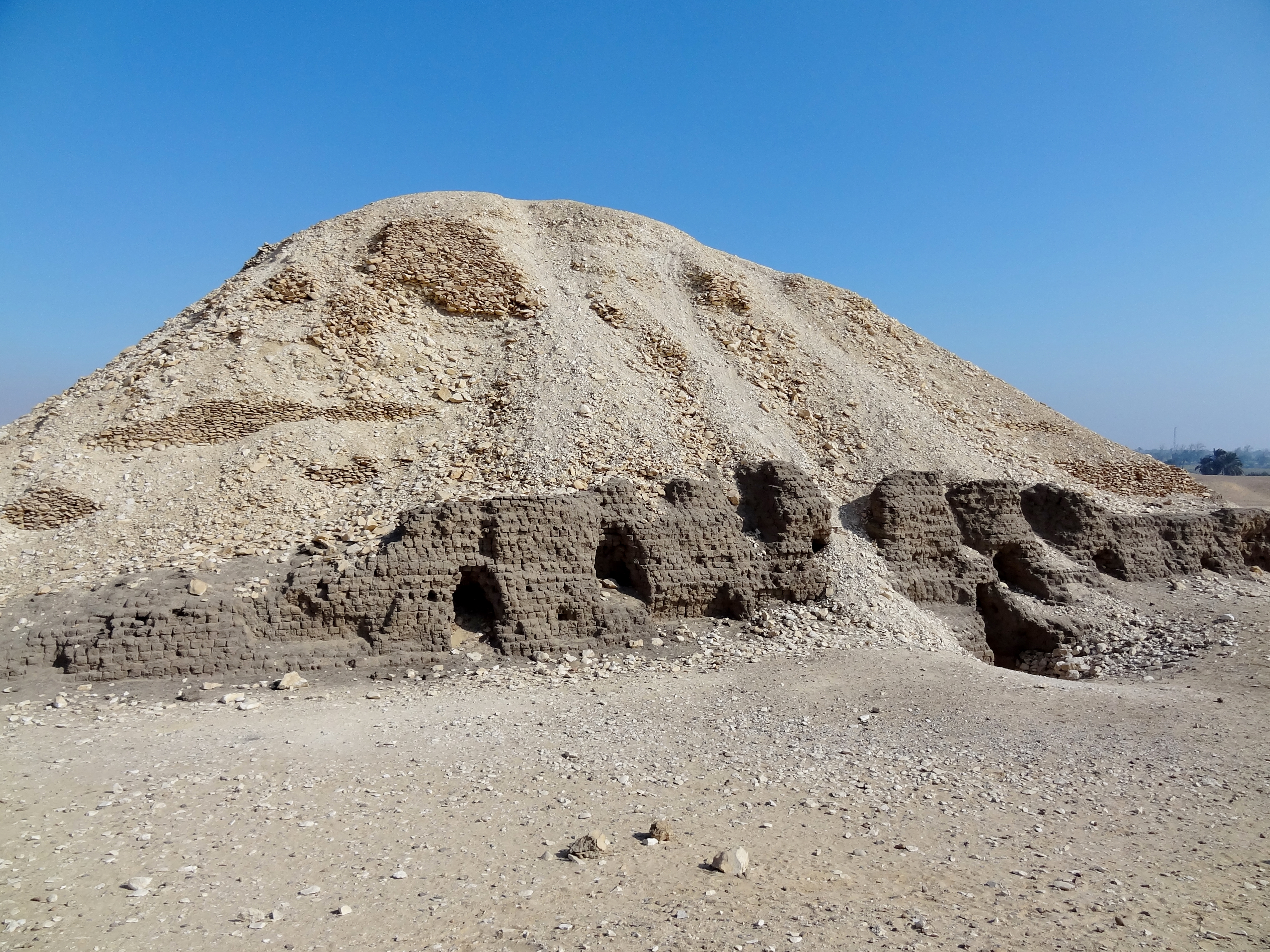 Mastaba M17 von Meidum, Ägypten